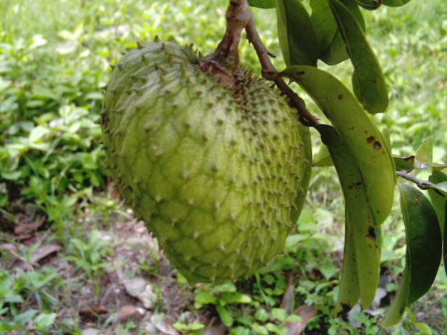 Guanábana